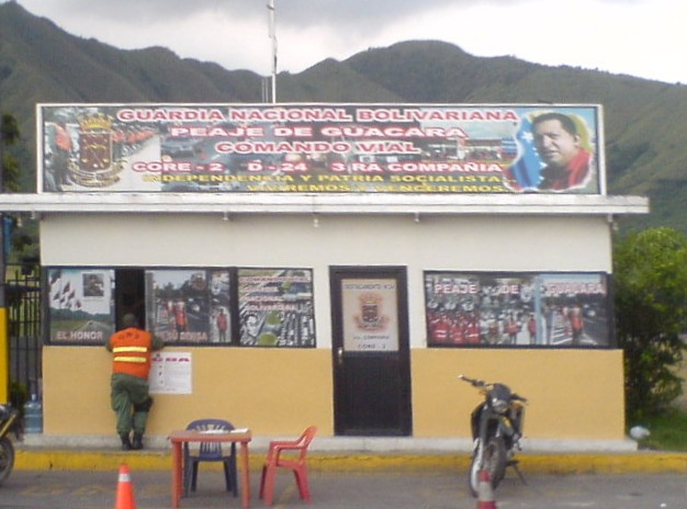 Primero colocado en doy todos los derechos para su uso